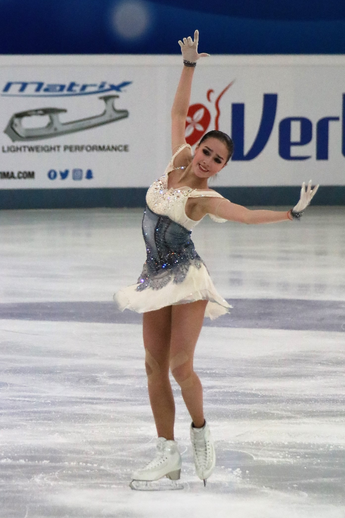 Алина Загитова на чемпионате России по фигурному катанию на коньках 2019